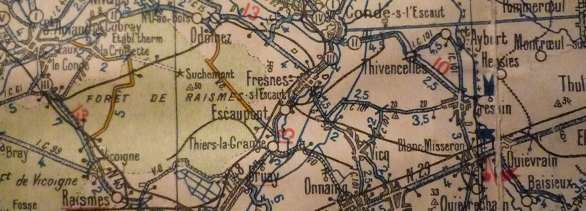 Tracé de l'ancienne Ligne Saint-Amand-les-Eaux - Blanc-Misseron, Nord-Pas-de-Calais, France